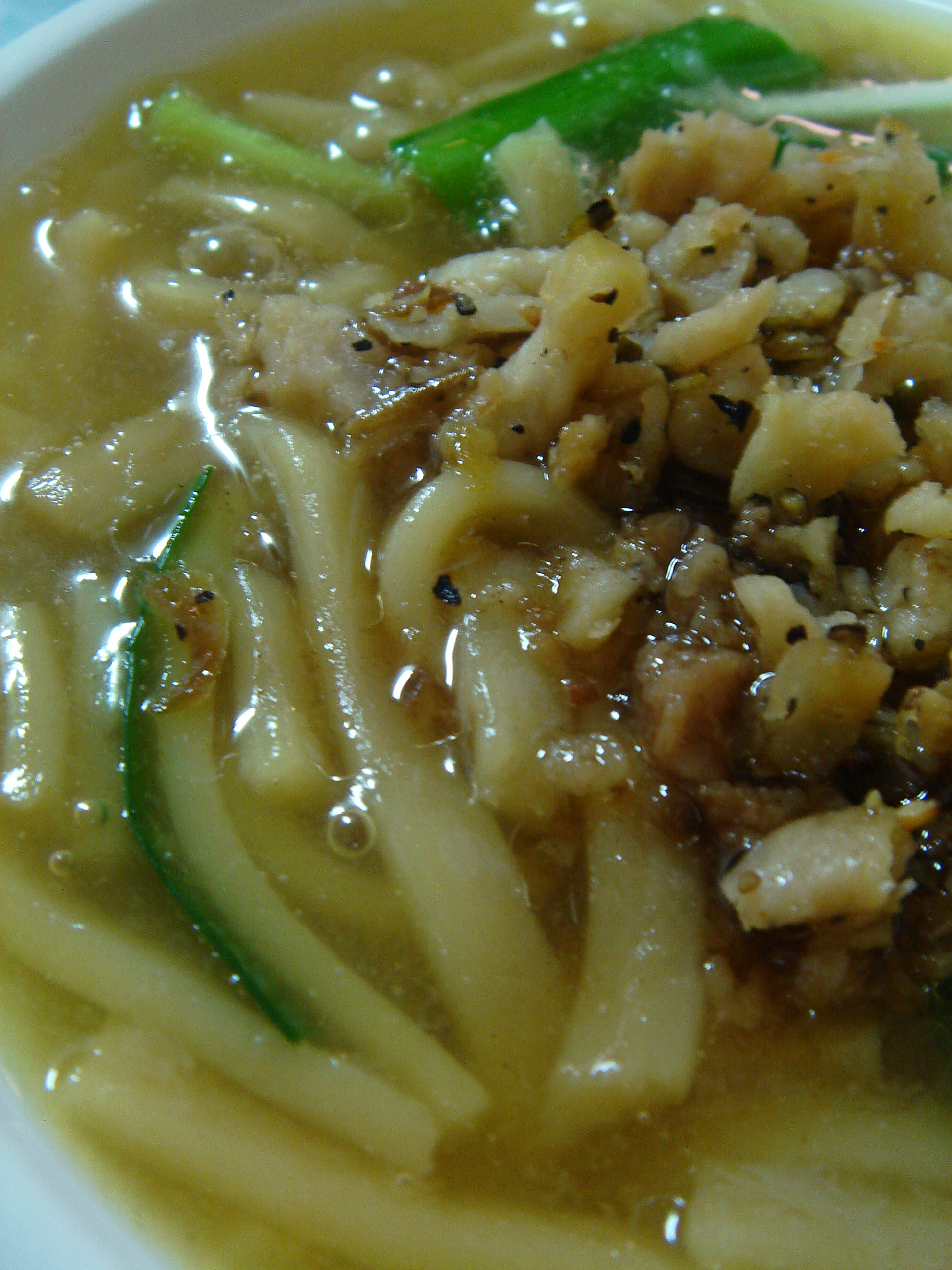 中文（台灣）: 台中大麵焿